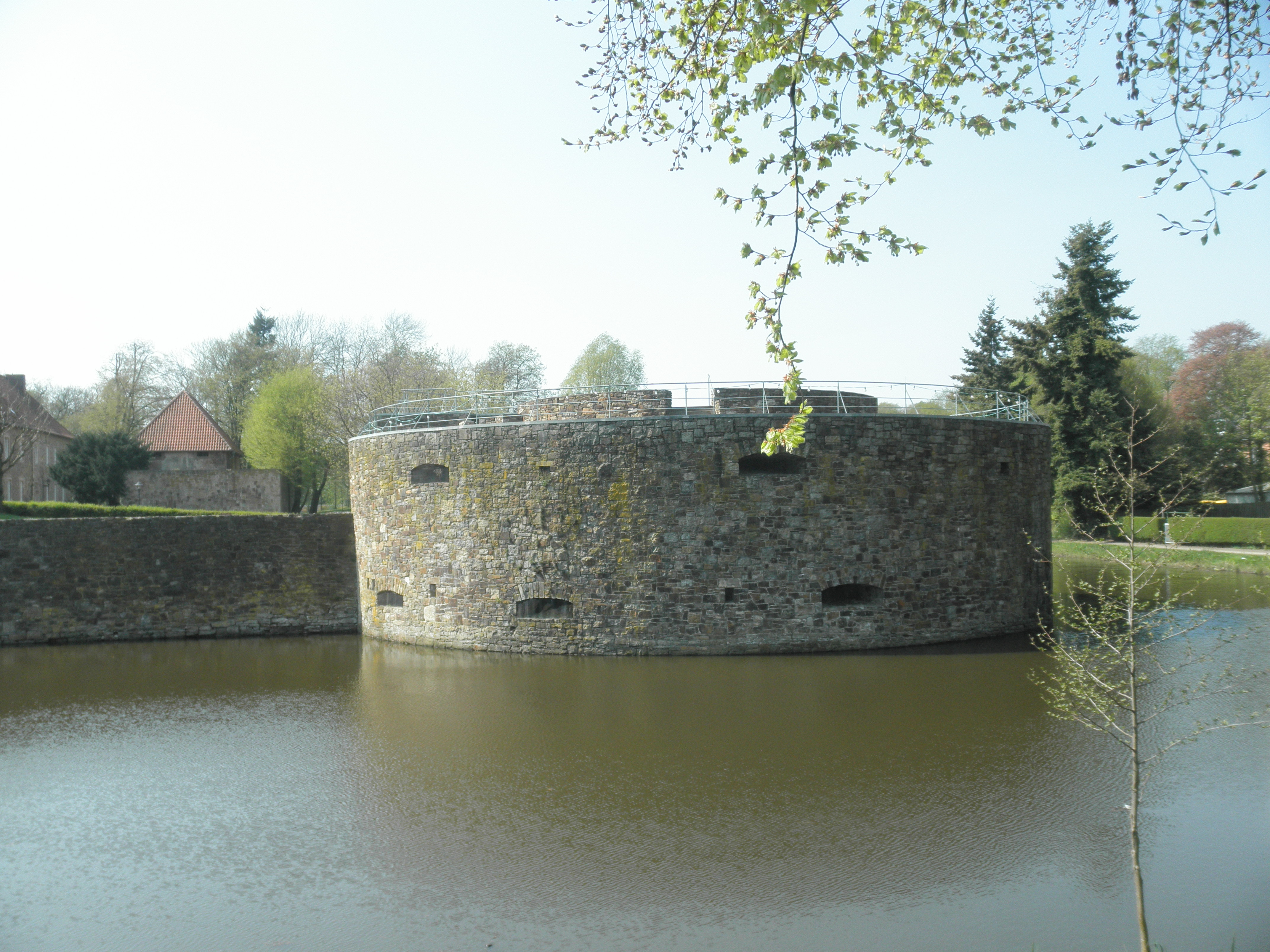 Nordorienta bastiono de kasteloFürstenau